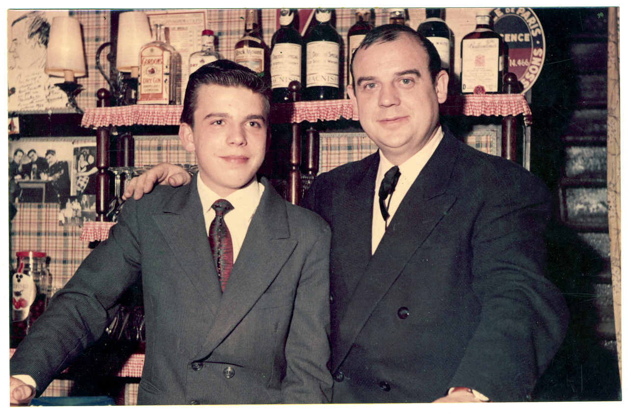 Maurice His avec son fils Jean-Pierre à la Bonne Franquette